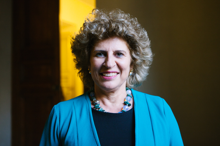 Paulina Veloso, abogada chilena.